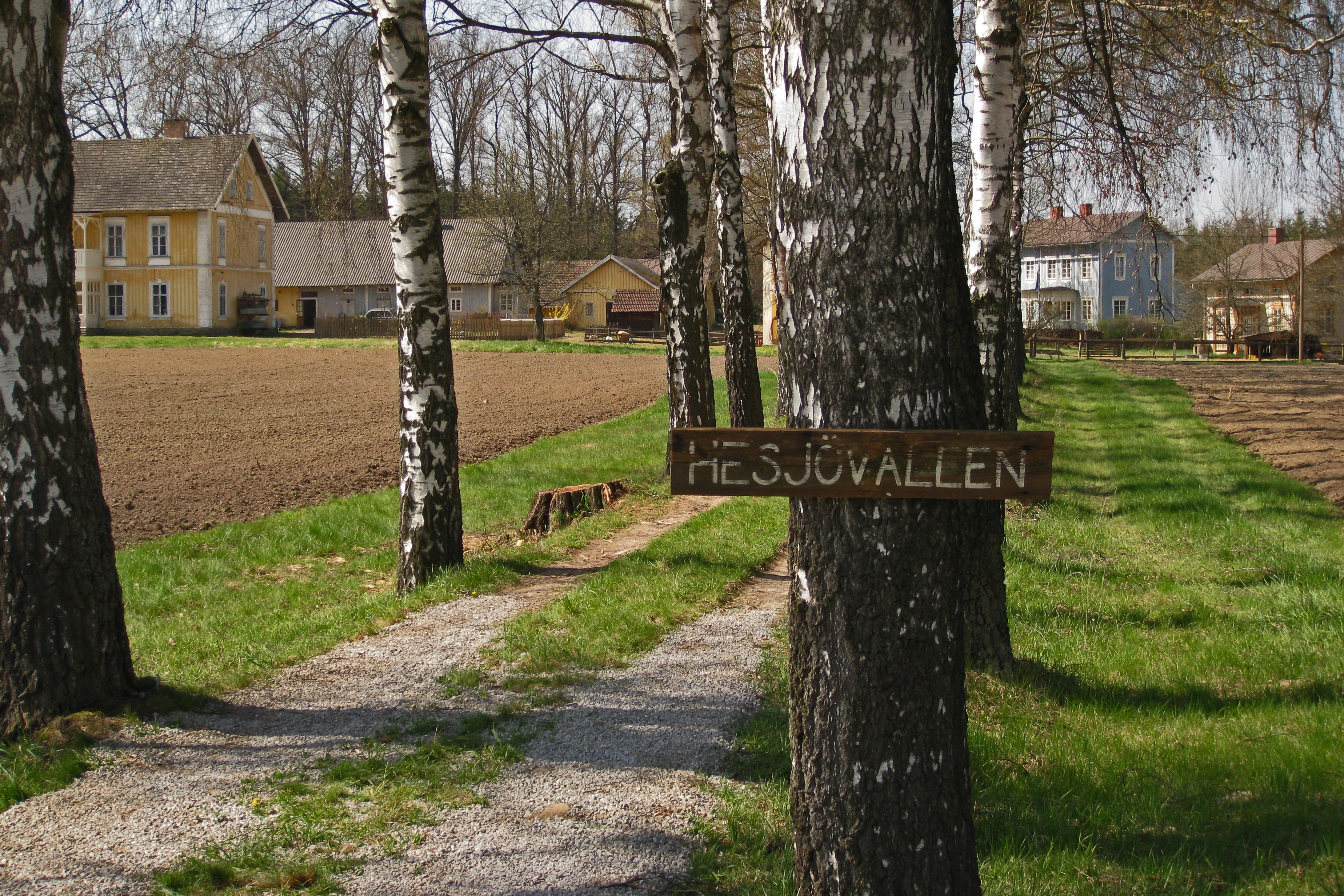 Im Frühjahr 2010 wurden Szenen für den Film "Der Chinese" in Pürbach bei Schrems (Waldviertel) gedreht.